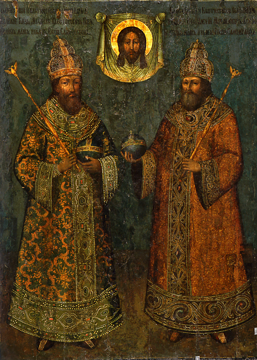 Icon "Mandylion with tsar Michael and his son tsar Alexis"/ Икона "Спас нерукотворный с предстоящими царями Михаилом Федоровичем и Алексеем Михайловичем" Феодор Евтихиев Зубов Устюженец. Царь Михаил Федорович и царь Алексей Михайлович, предстоящие перед образом Спаса Нерукотворного (1678 г.). ГИМ . Инв. 29174, И-VIII-3810